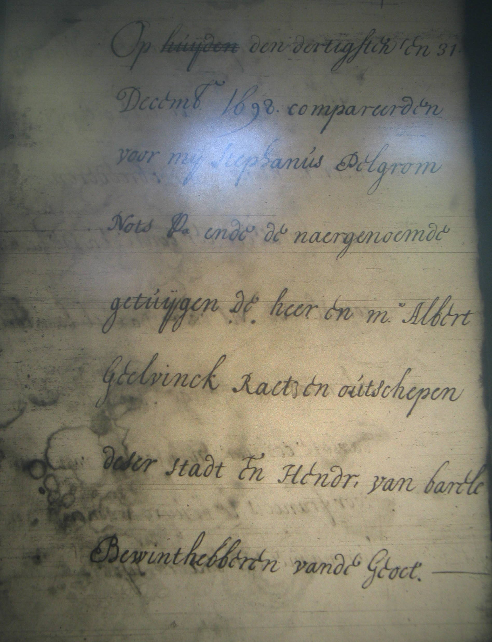 Akte waarin opdracht wordt gegeven 500 slaven te halen in Afrika en naar Suriname te vervoeren